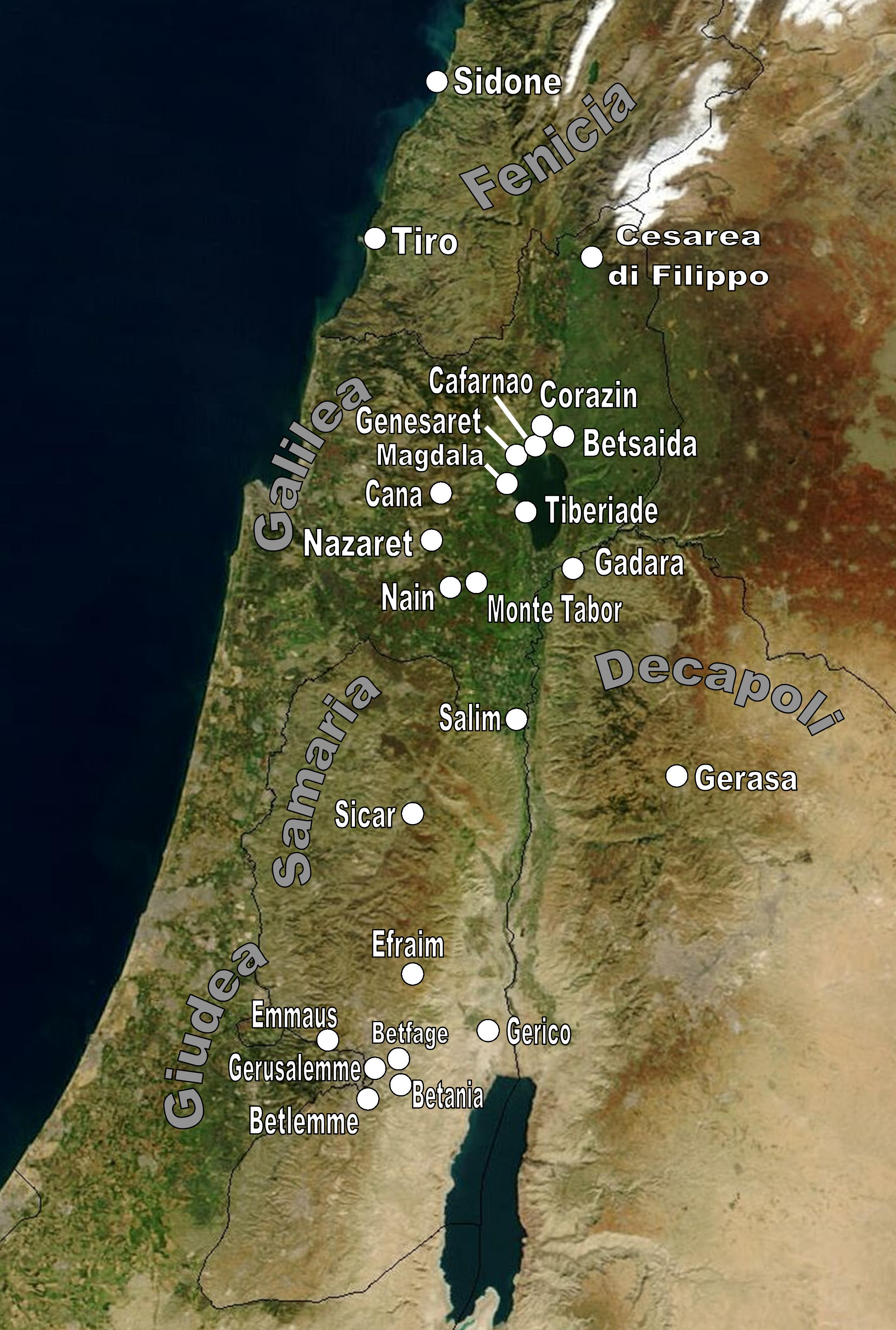 Luoghi frequentati da Gesù.